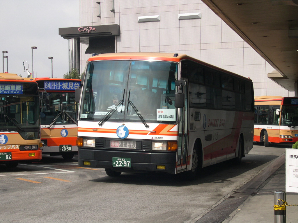 姫路駅 神姫バスターミナルにて 2003-4-13撮影